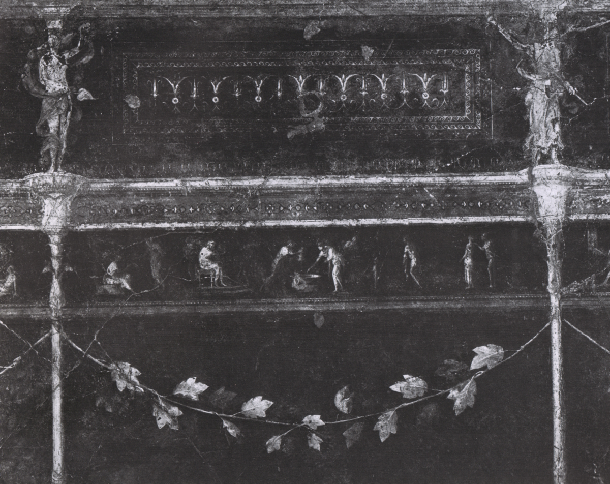 Affresco romano dalla Casa della Farnesina (Roma), sala nera.